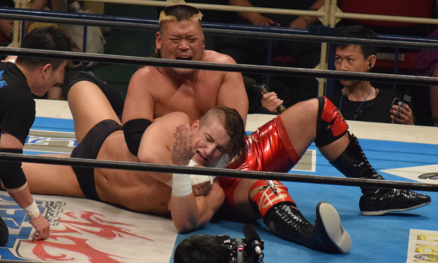 2016年6月19日 大阪城ホール 「DOMINION 6.19 in OSAKA-JO HALL」 ジェイ・ホワイトにアナコンダマックスを極める天山広吉